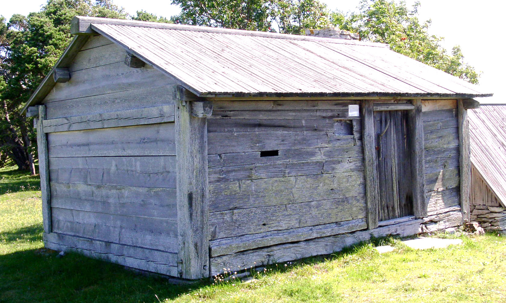 Strandbod i Kovik, Gotland byggd i Skiftesverksteknik. Flyttad från Gnisvärd Tofta 1948. Tillhörde Smågårda, Oskar Karlsson. Bulhus. (källa: infotavla på platsen)